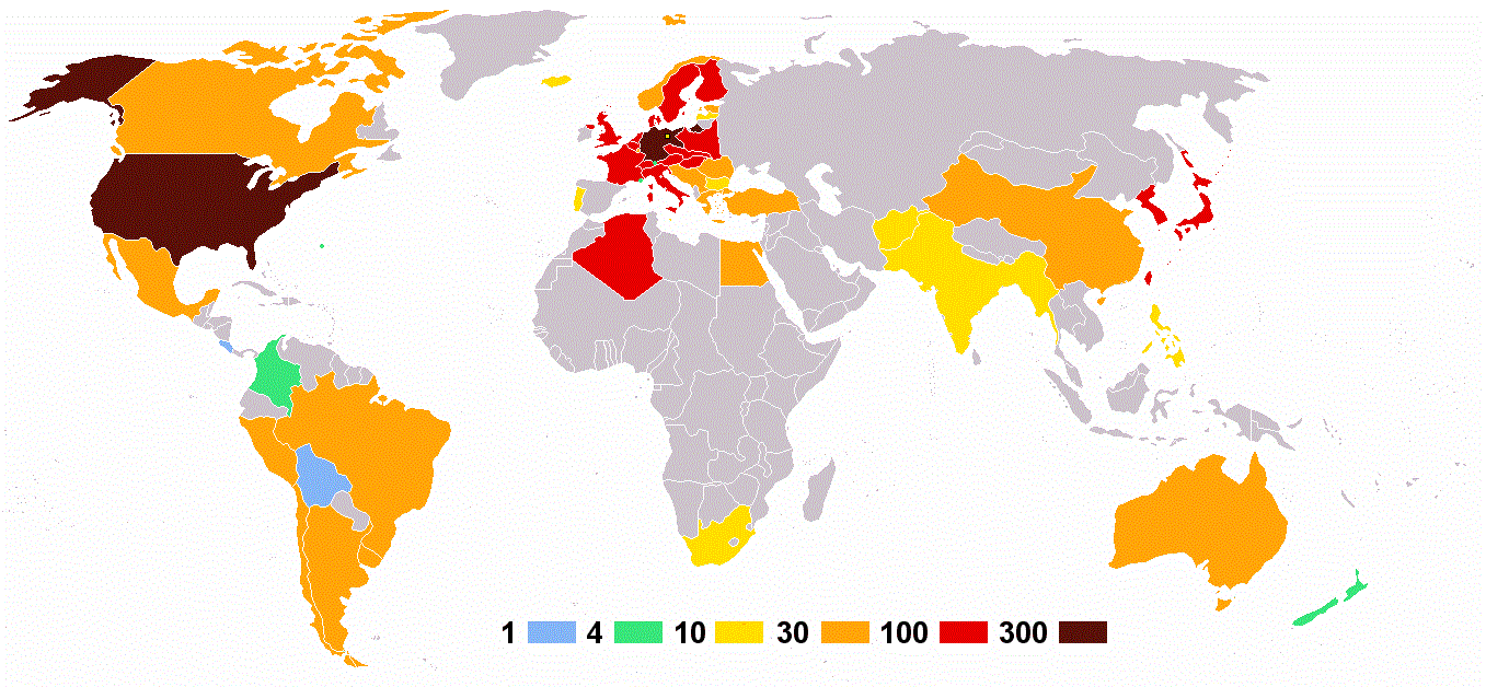 Anzahl der Athleten